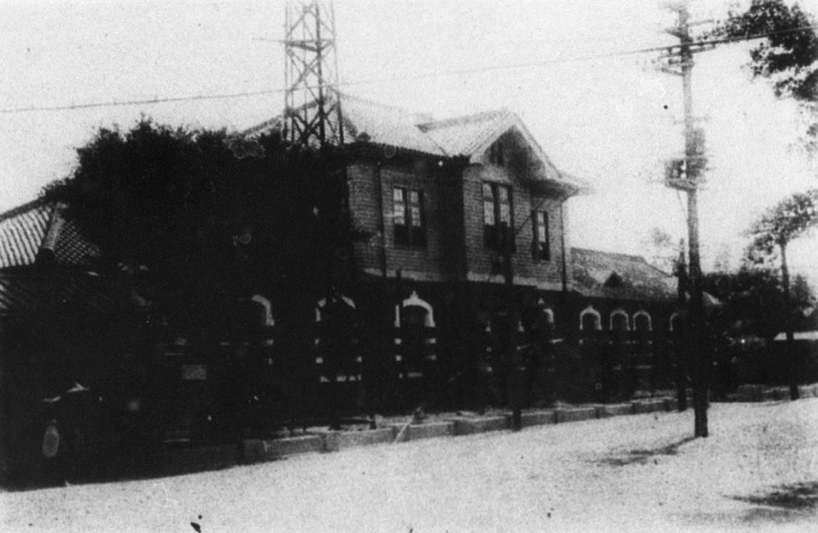 中文（台灣）: 海山郡役所